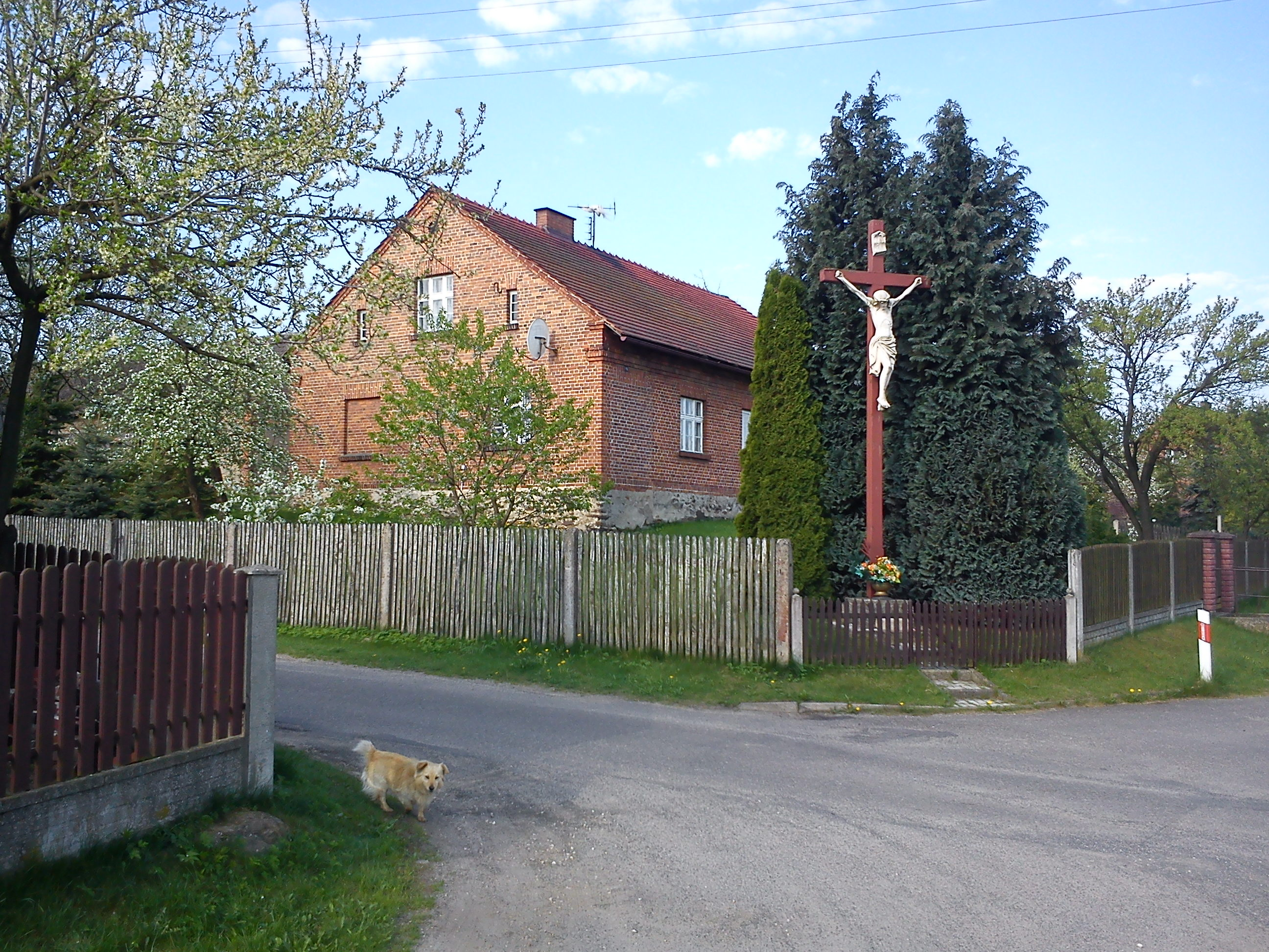 Wolęcin - główne skrzyżowanie we wsi.